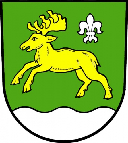 znak, Malá Losenice, okres Žďár nad Sázavou